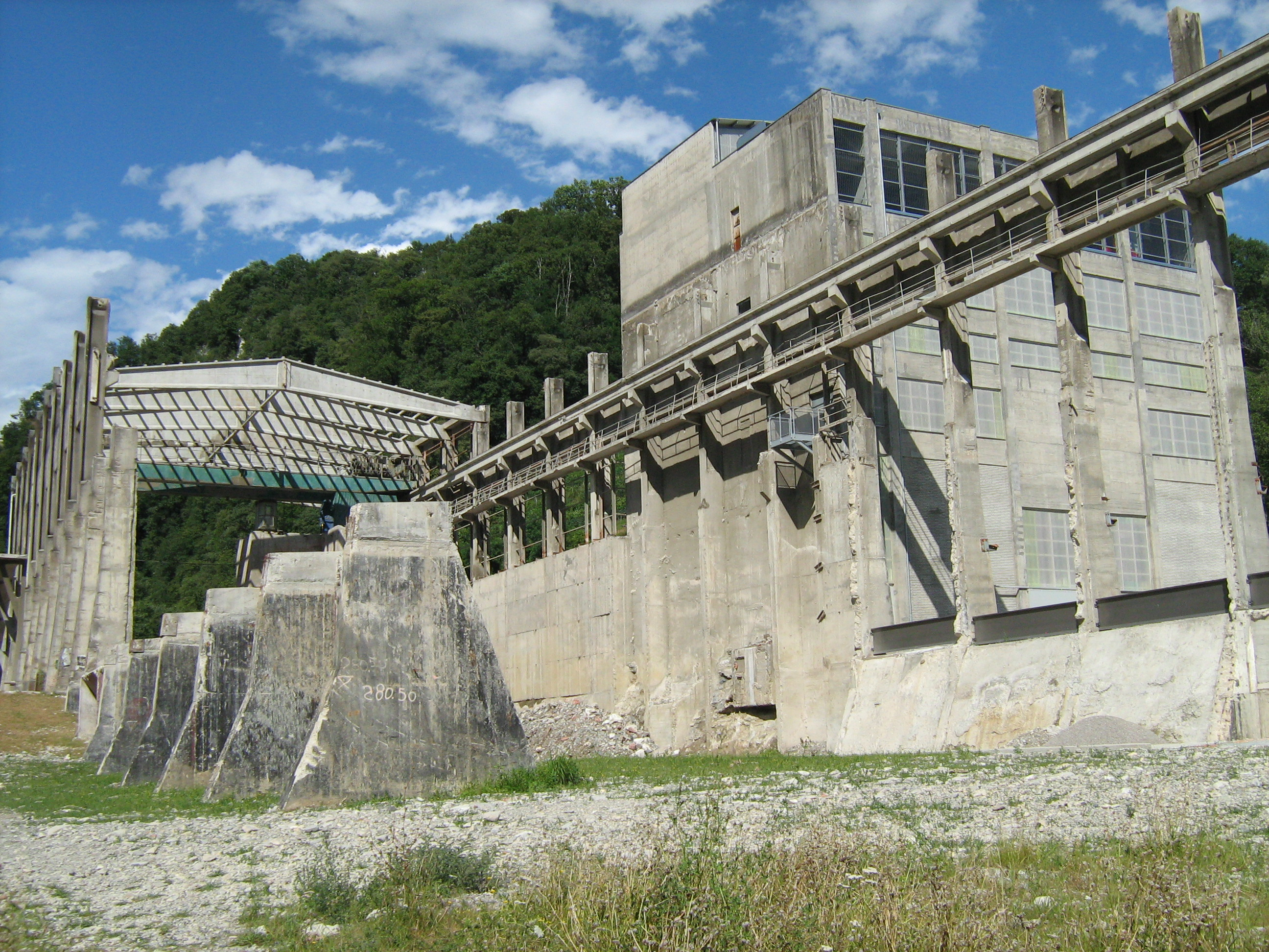 Ex cementificio Saceba, dopo la riqualifica territoriale nel Parco delle Gole della Breggia